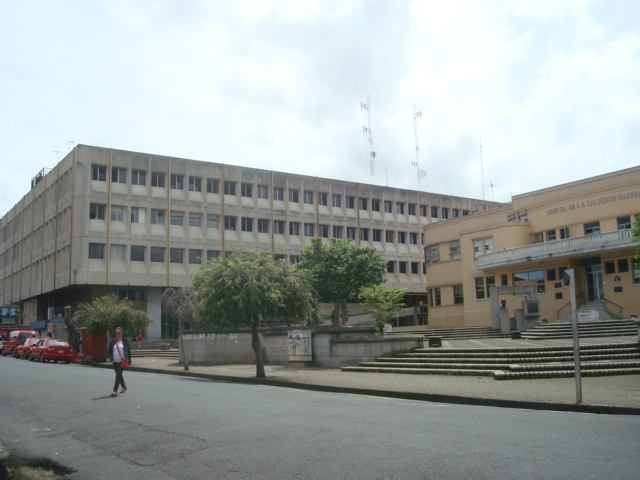 Hospital Dr. Rafael Ángel Calderón Guardia, en Barrio Aranjuez, San José de Costa Rica.